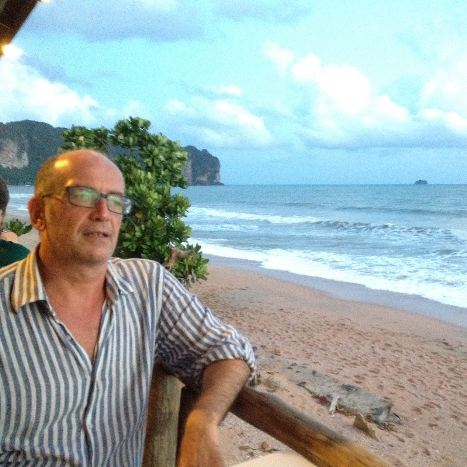 Lo scrittore Igino Domanin.